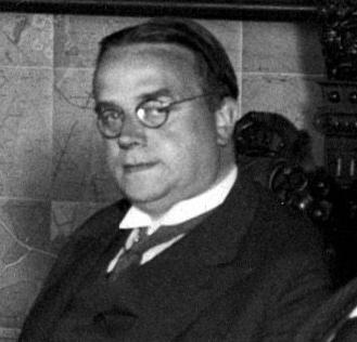 Timotheus Josephus Verschuur (1886-1945), Nederlands politicus